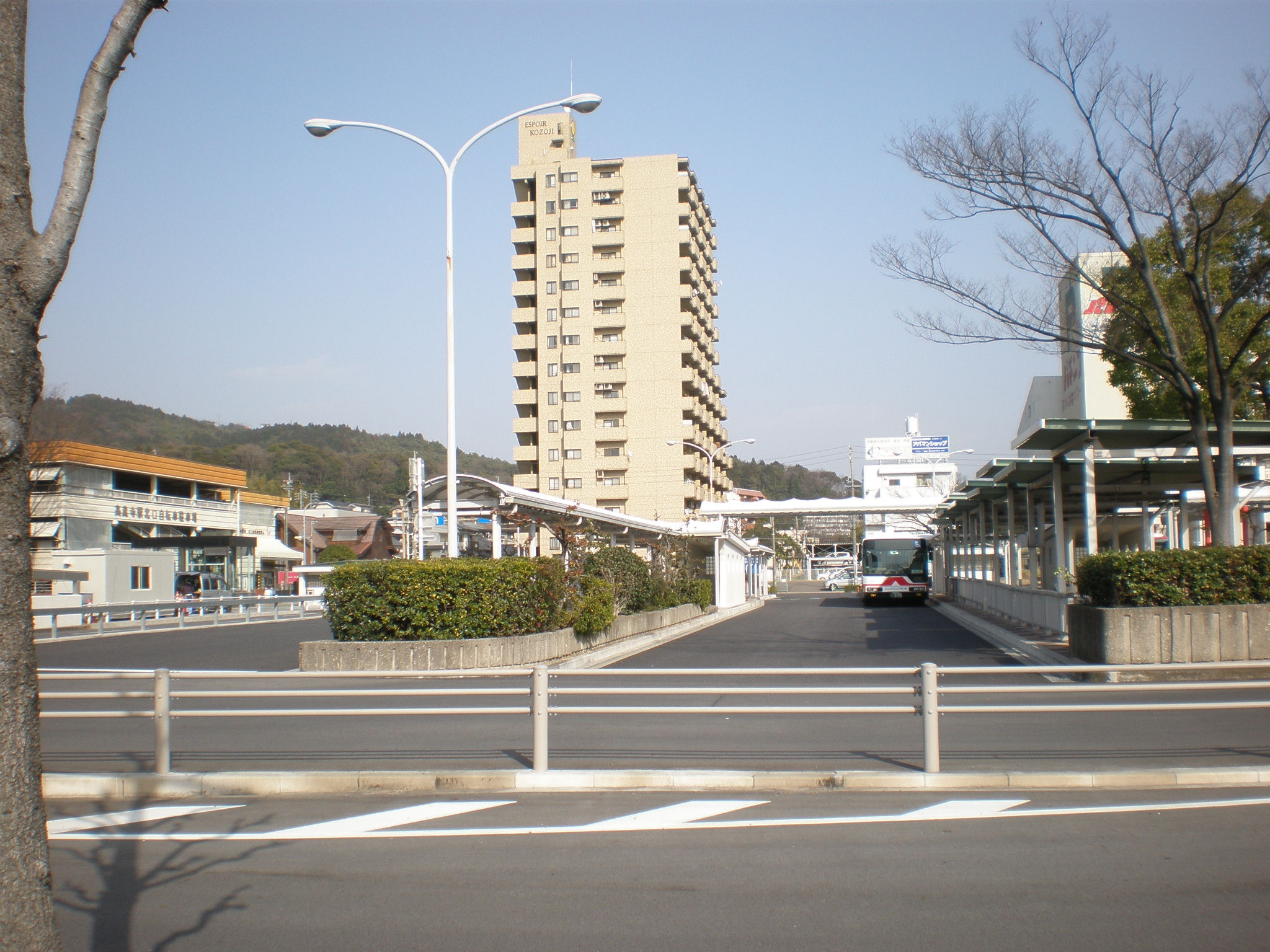 愛知県春日井市にある高蔵寺駅北口バスターミナル。